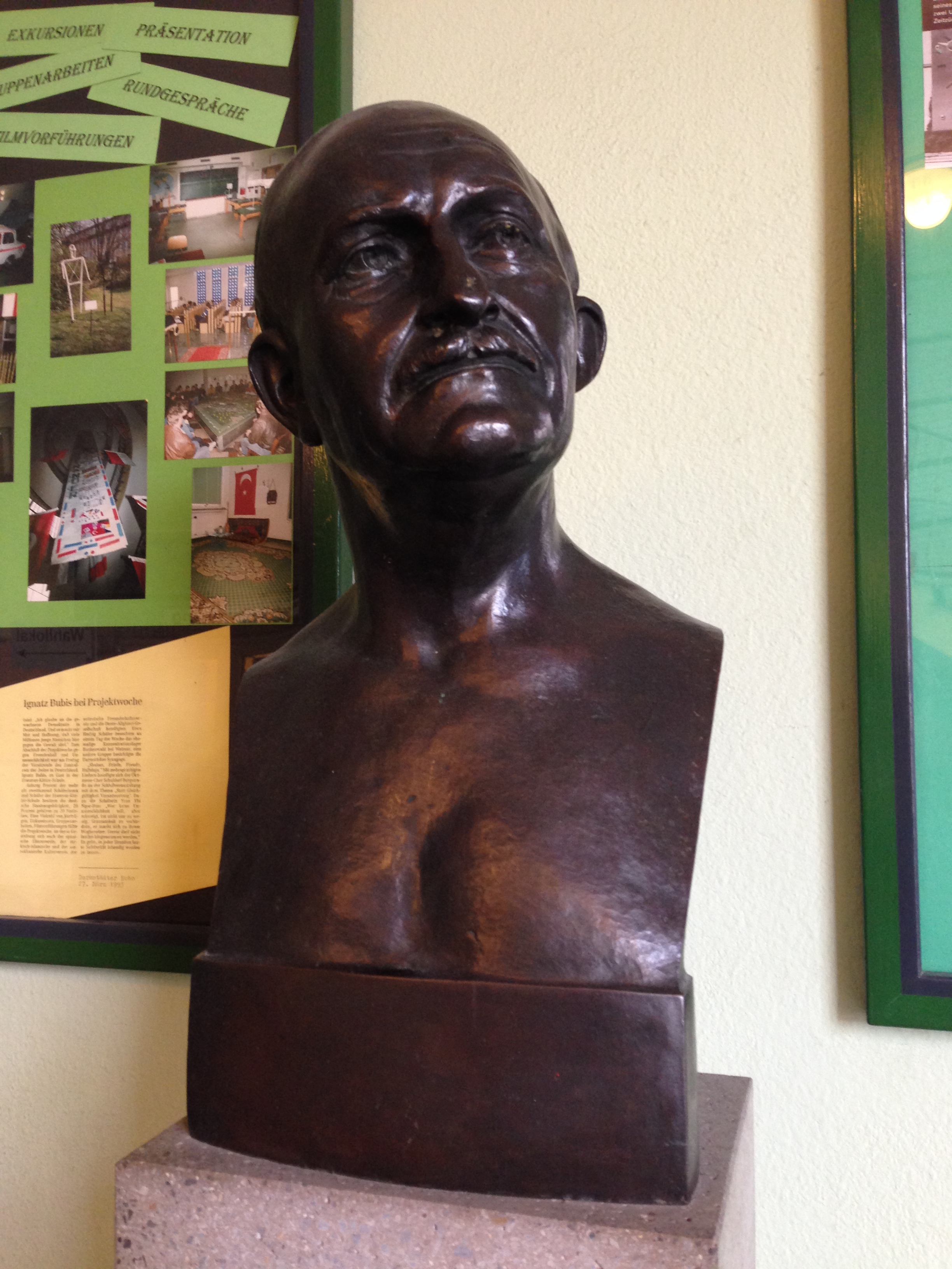 August-Euler-Büste aufgestellt in der Behrens-Schule in Darmstadt